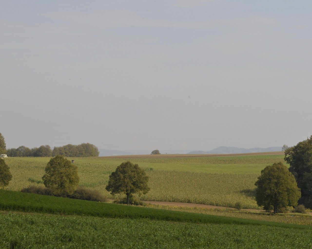 Donau-Ries